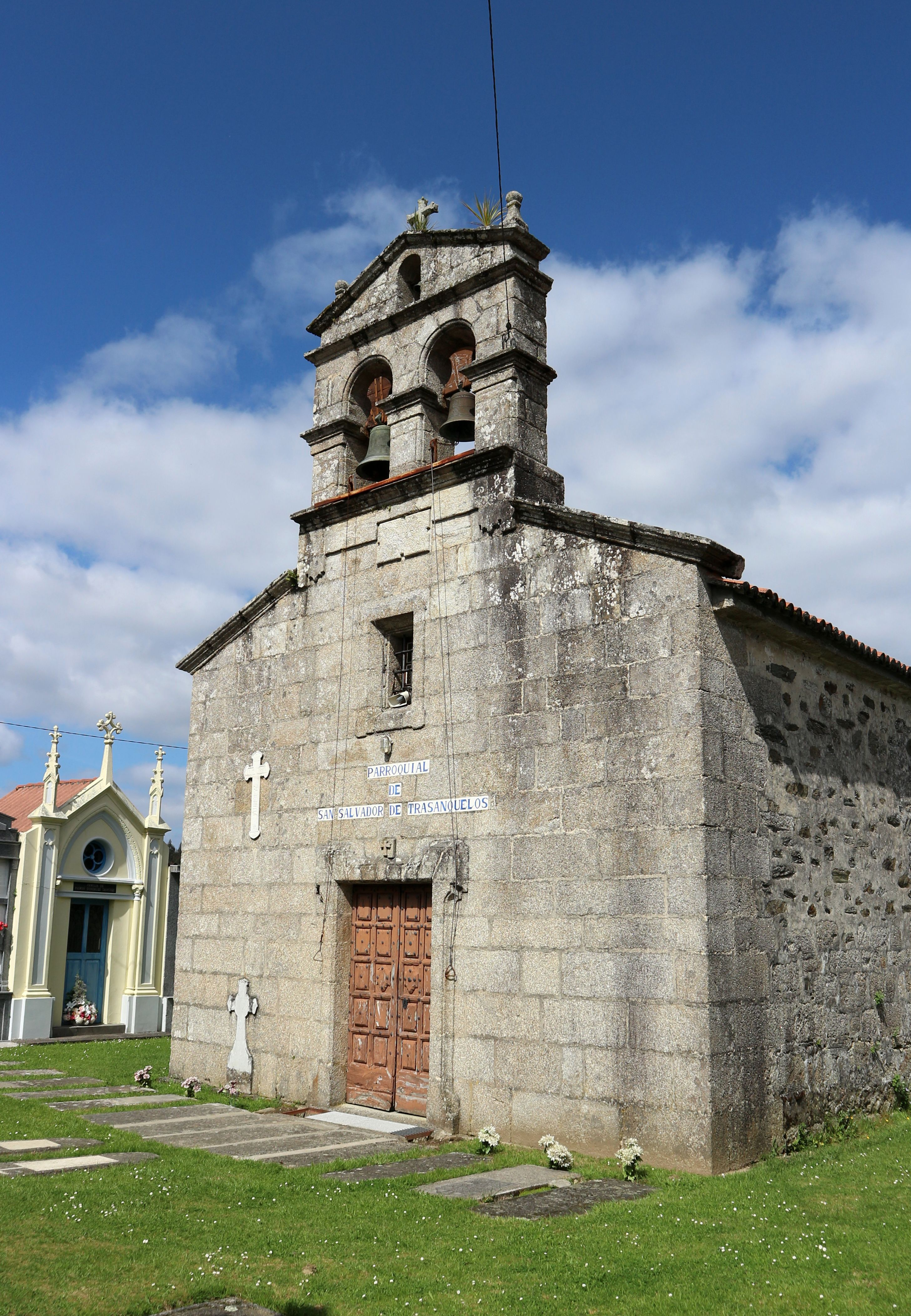 Igrexa de San Salvador de Trasanquelos. Trasanquelos, Oza-Cesuras.